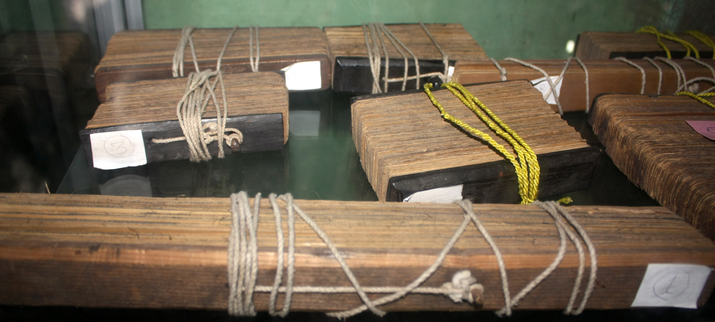 எழுத்தோலைகள் - மட்டக்களப்பு அருங்காட்சியகம்